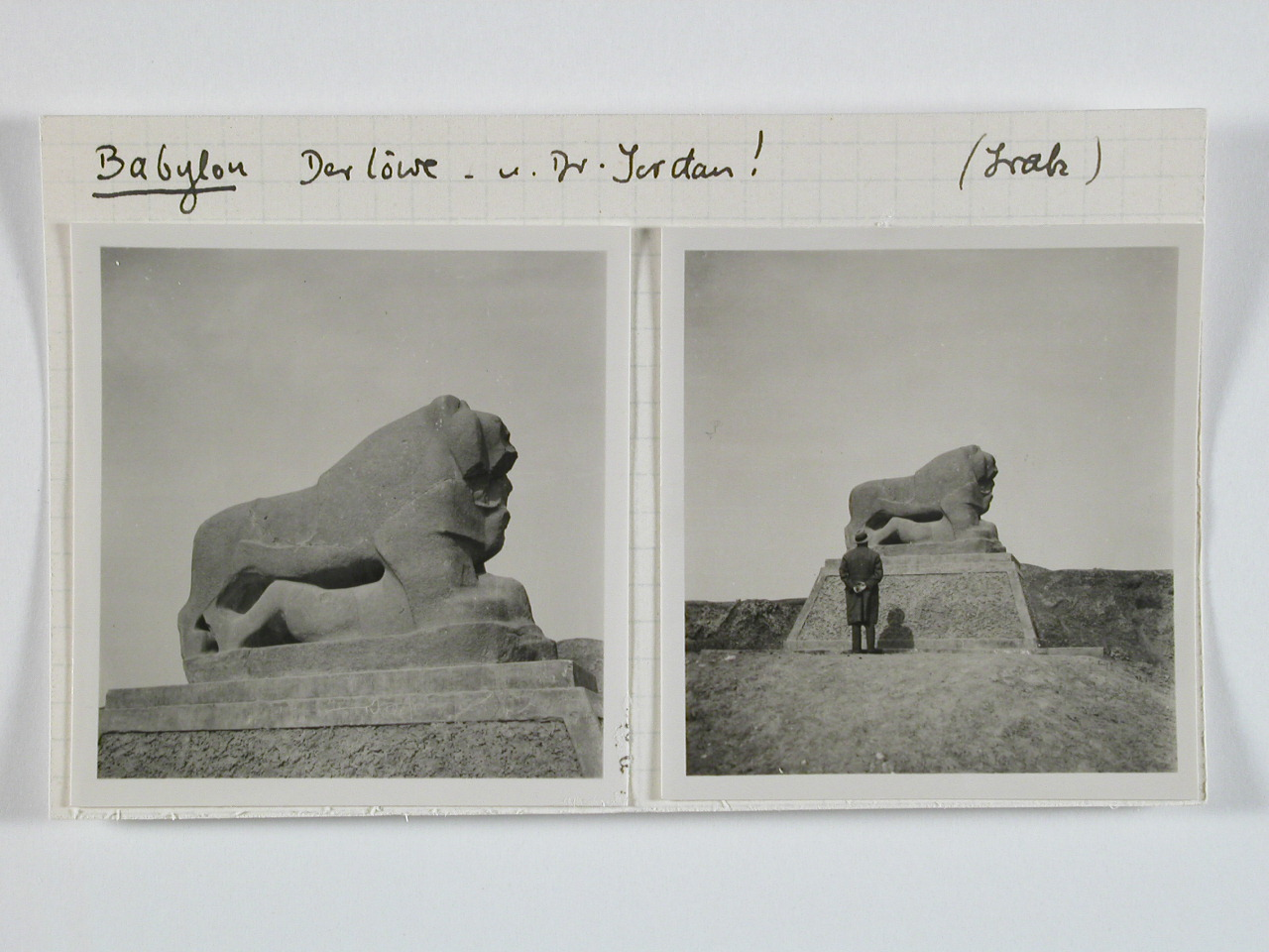 Irak, Babylon: Denkmal Löwe; Karteikarte: Denkmal Löwe; Archäologe Julius Jordan vor dem Denkmal Löwe